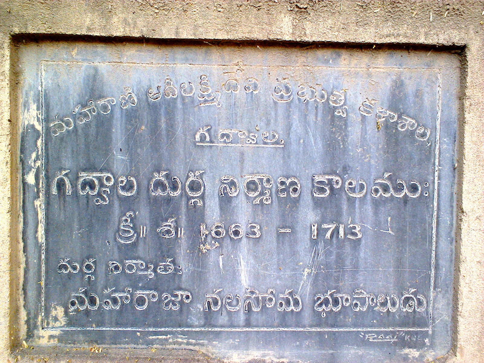 శిలాఫలకం